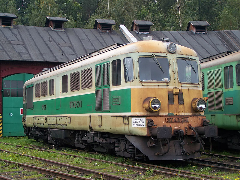 Lokomotywa ST43-241 na terenie lokomotywowni w Wałbrzychu